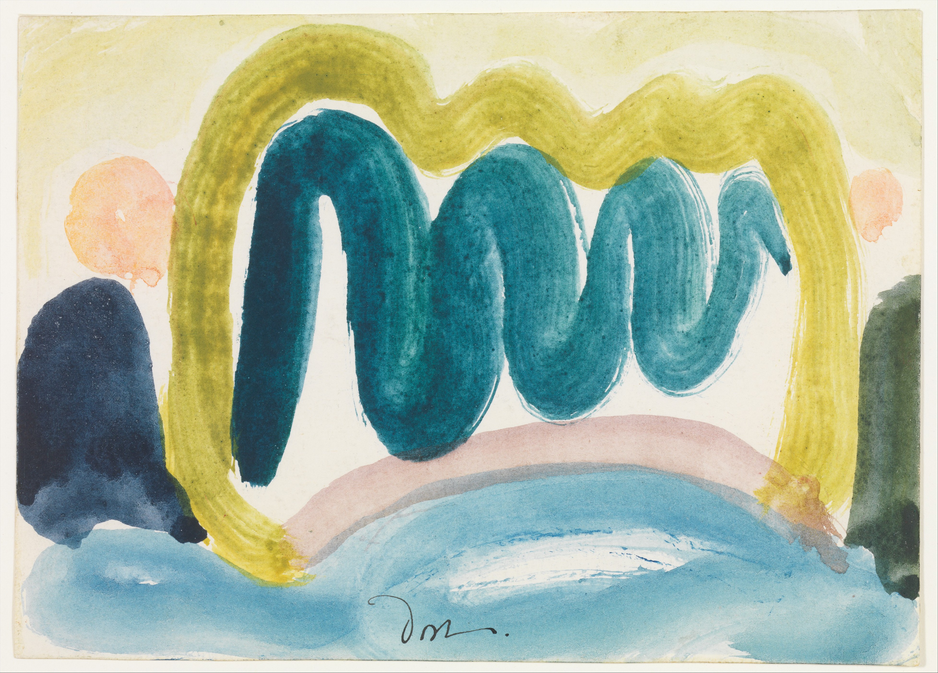 Drawing; Drawings